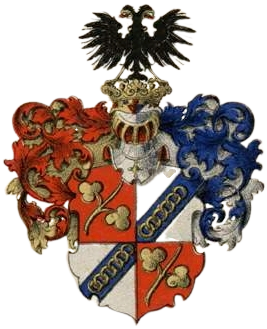 Wahli suguvõsa aadlivapp (2)